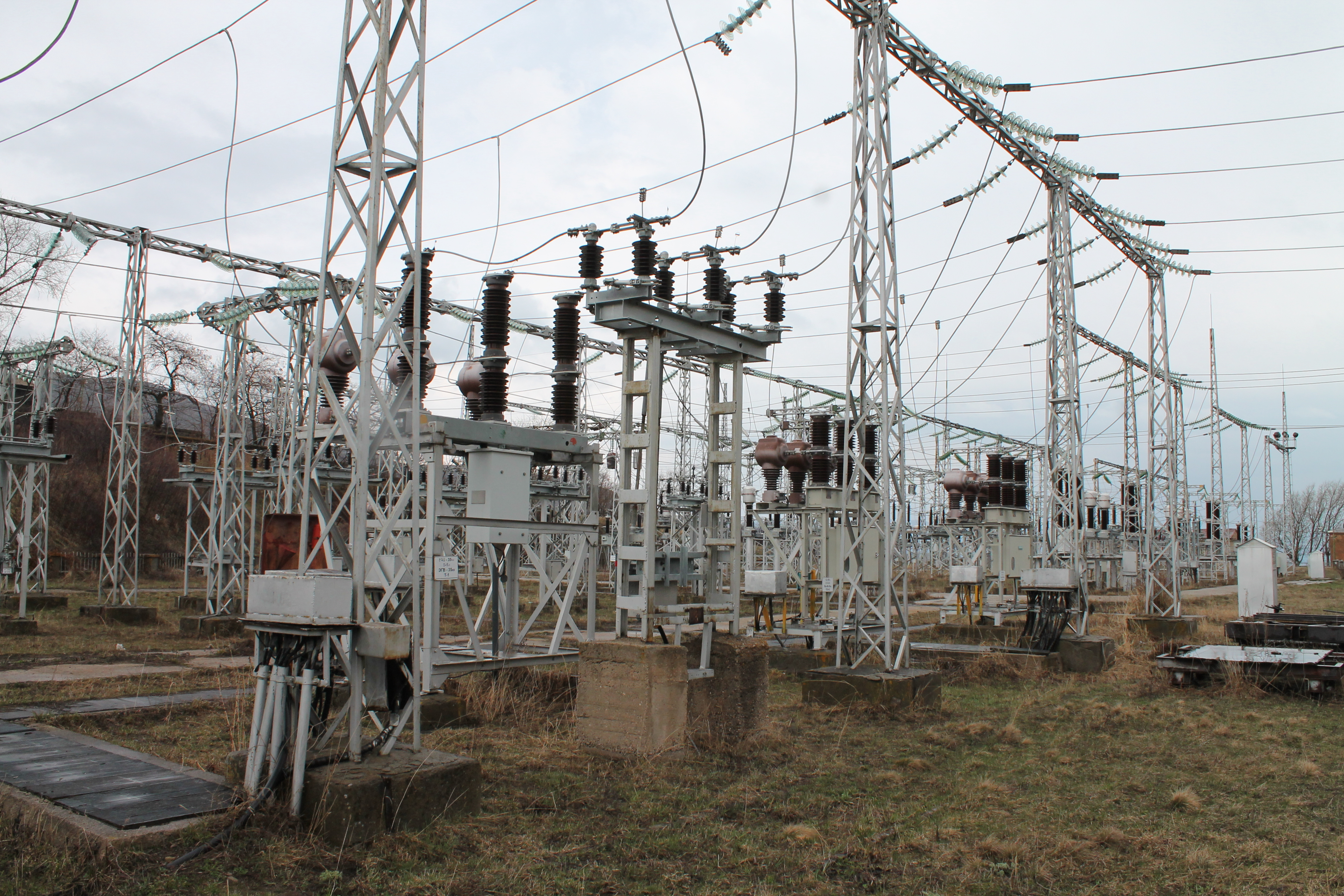 Распределительное устройство Севанской ГЭС